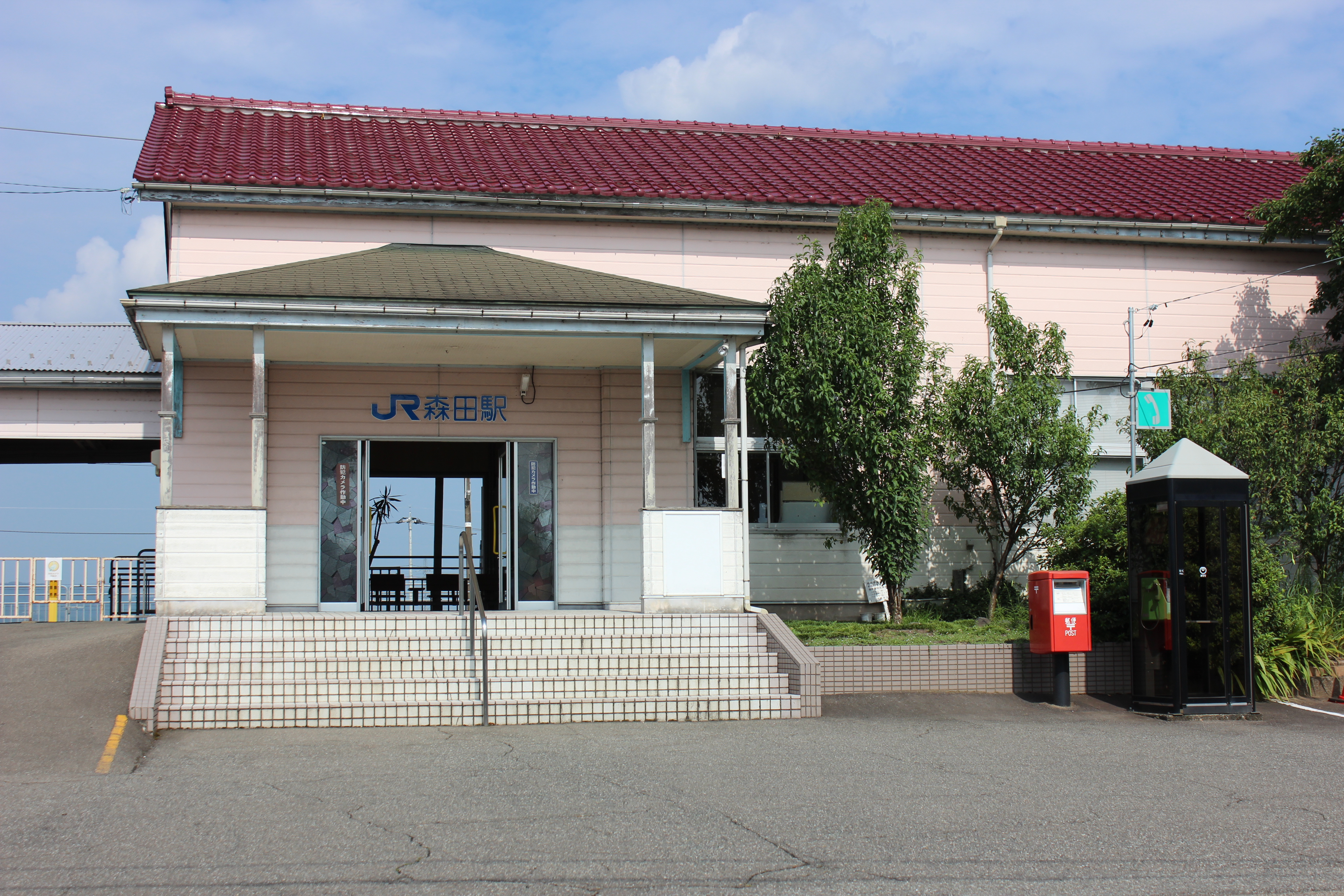 森田駅（福井県福井市）